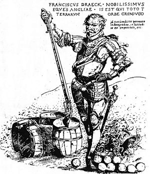 El temido corsario inglés Sir Francis Drake llegó a la costa de "El Mar del Sur" (Océano Pacífico) cruzando por el Cabo de Buena Esperanza en 1578.